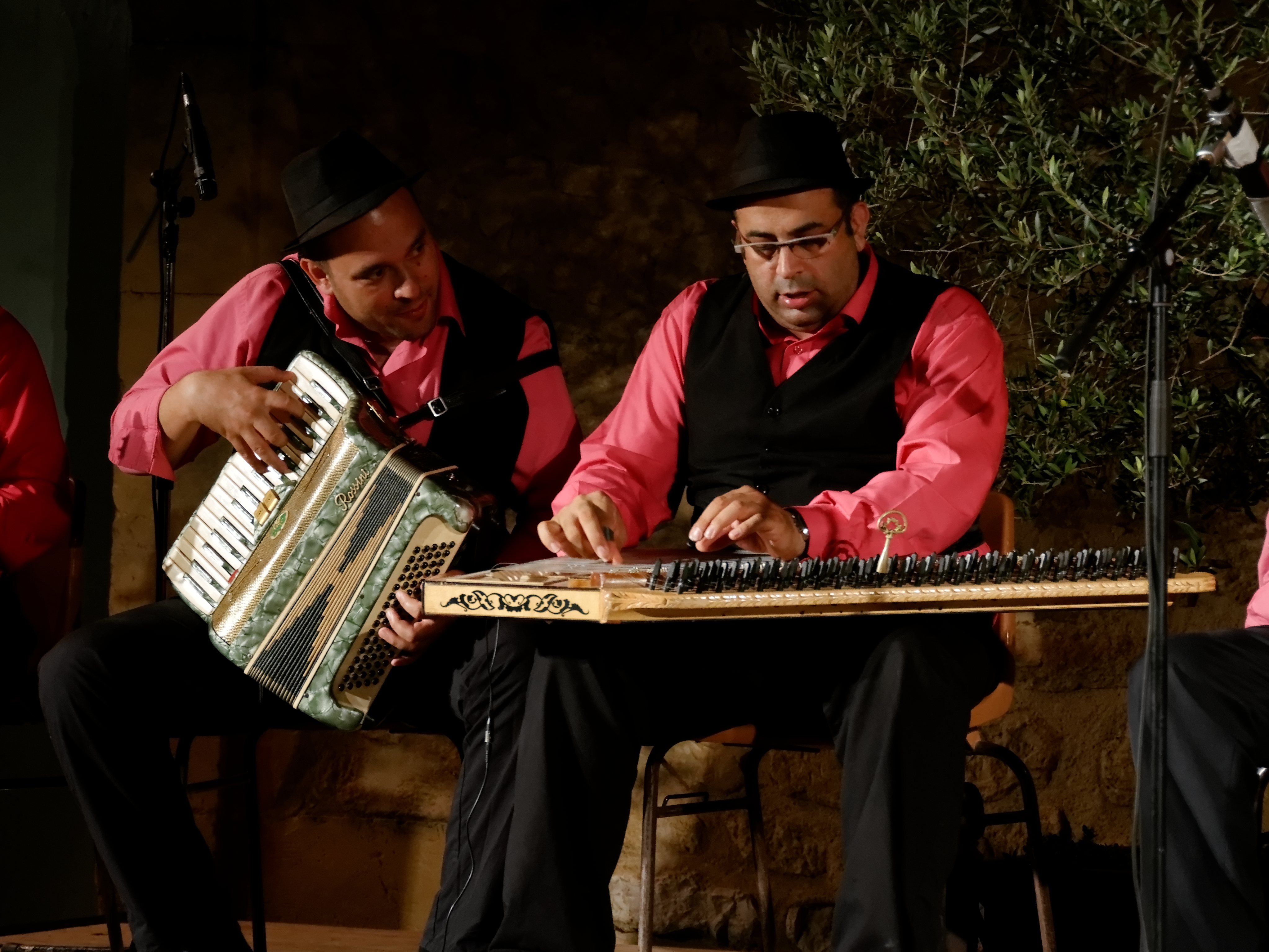 Les tsiganes de l'Ahırkapı Roman Orkestrası d'Istanbul. Kanoun (Qanûn) joué par Osman Dursan et accordéon joué par Cemal Davulcuoglu. Festival Durance Luberon 2014, France.